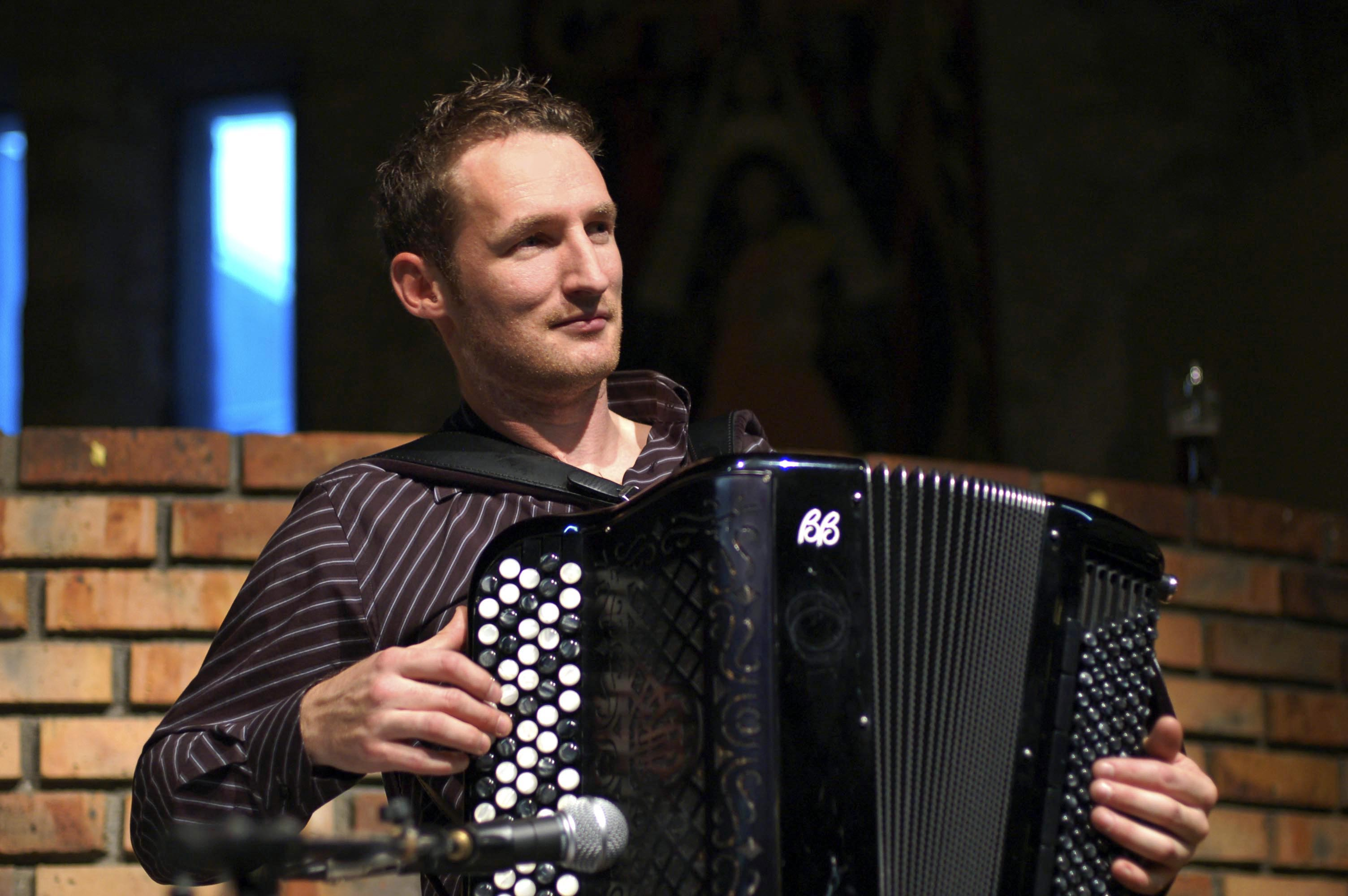 L'accordéoniste breton Régis Huiban en 2006